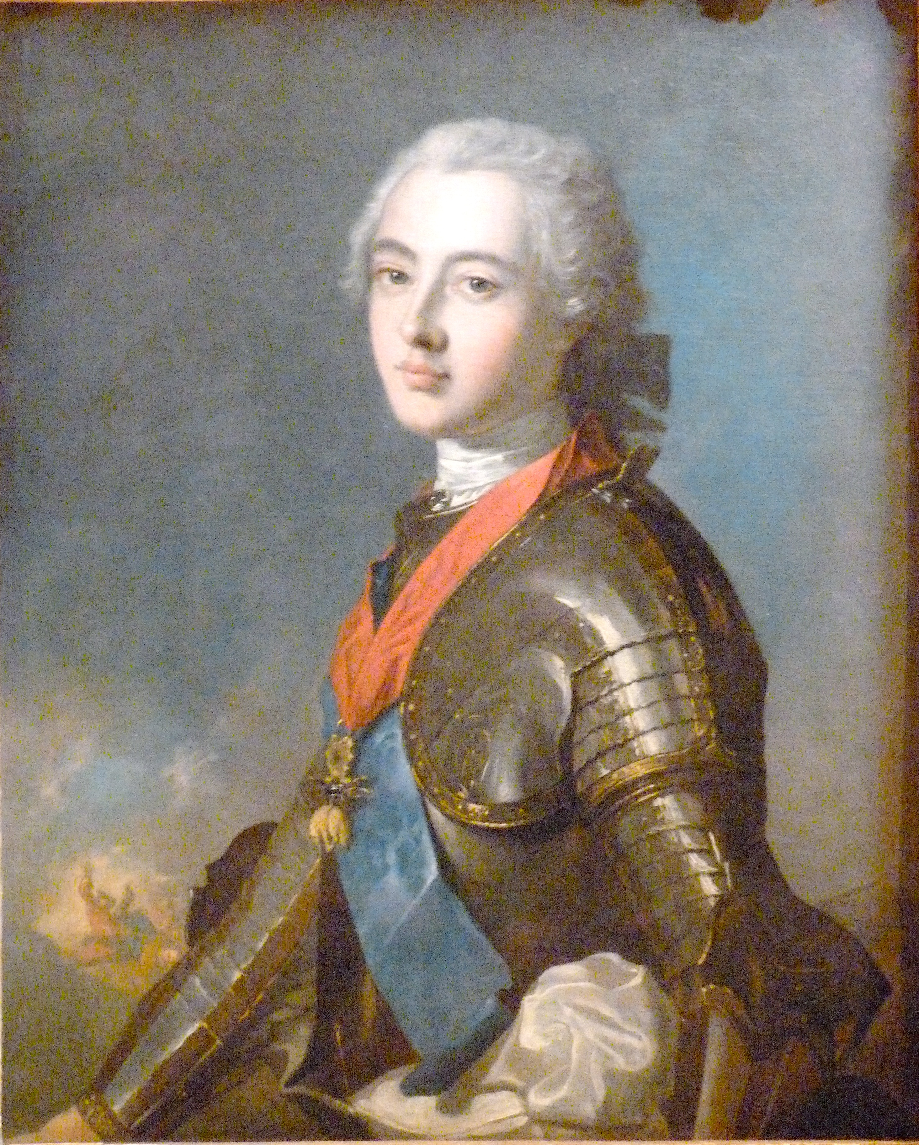 Louis-Jean-Marie de Bourbon, dit le duc de Penthièvre (petit fils de Louis XIV) à la bataille de Fontenoy (milieu du XVIIIe siècle), huile sur toile de Jean-Marc Nattier. Collection particulière de Georges de Lastic (1927-1988) lors de l'exposition Le cabinet d'un amateur, n°30, au musée de la chasse et de la nature, Paris (décembre 2009-mars 2010).